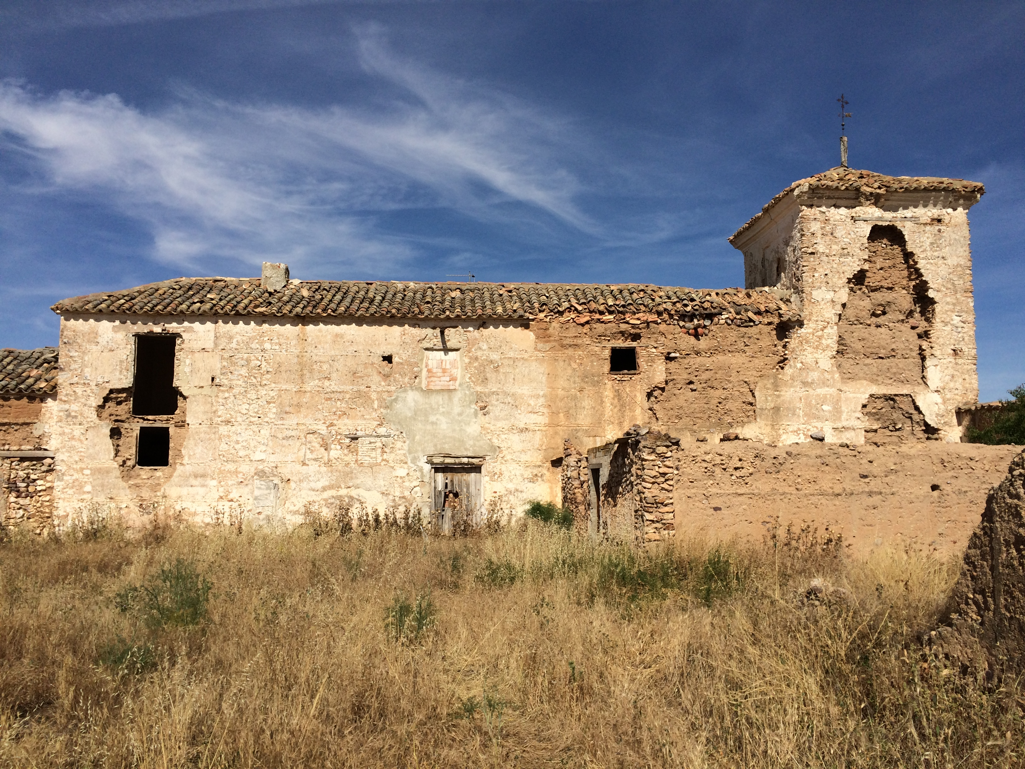 Estado actual de la Venta de Borondo: Necesidad urgente de intervención. Amenaza de ruina de torre y techumbres.